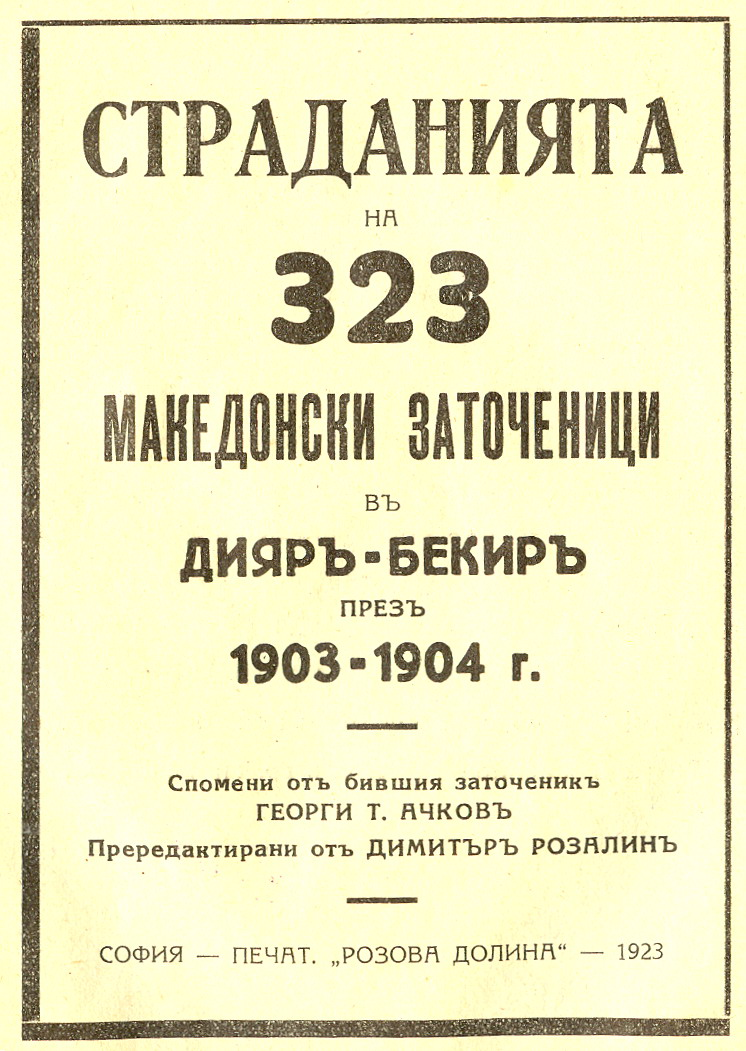 Страданията на 323 македонски заточеници